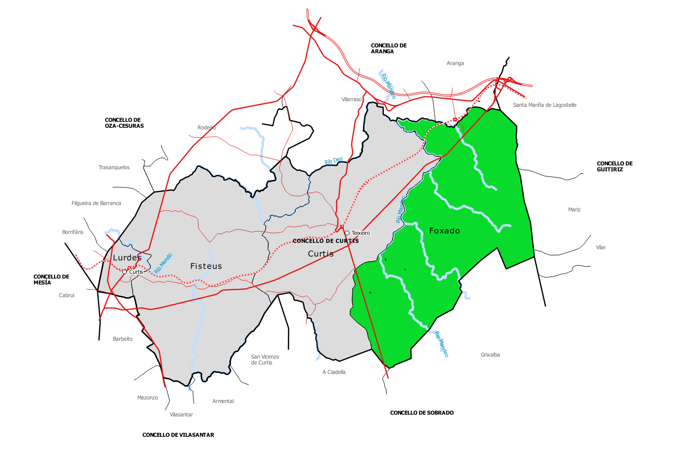 Mapa da parroquia de Foxado no concello de Curtis (Galiza).